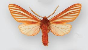 Pseudohemihyalea syracosia male